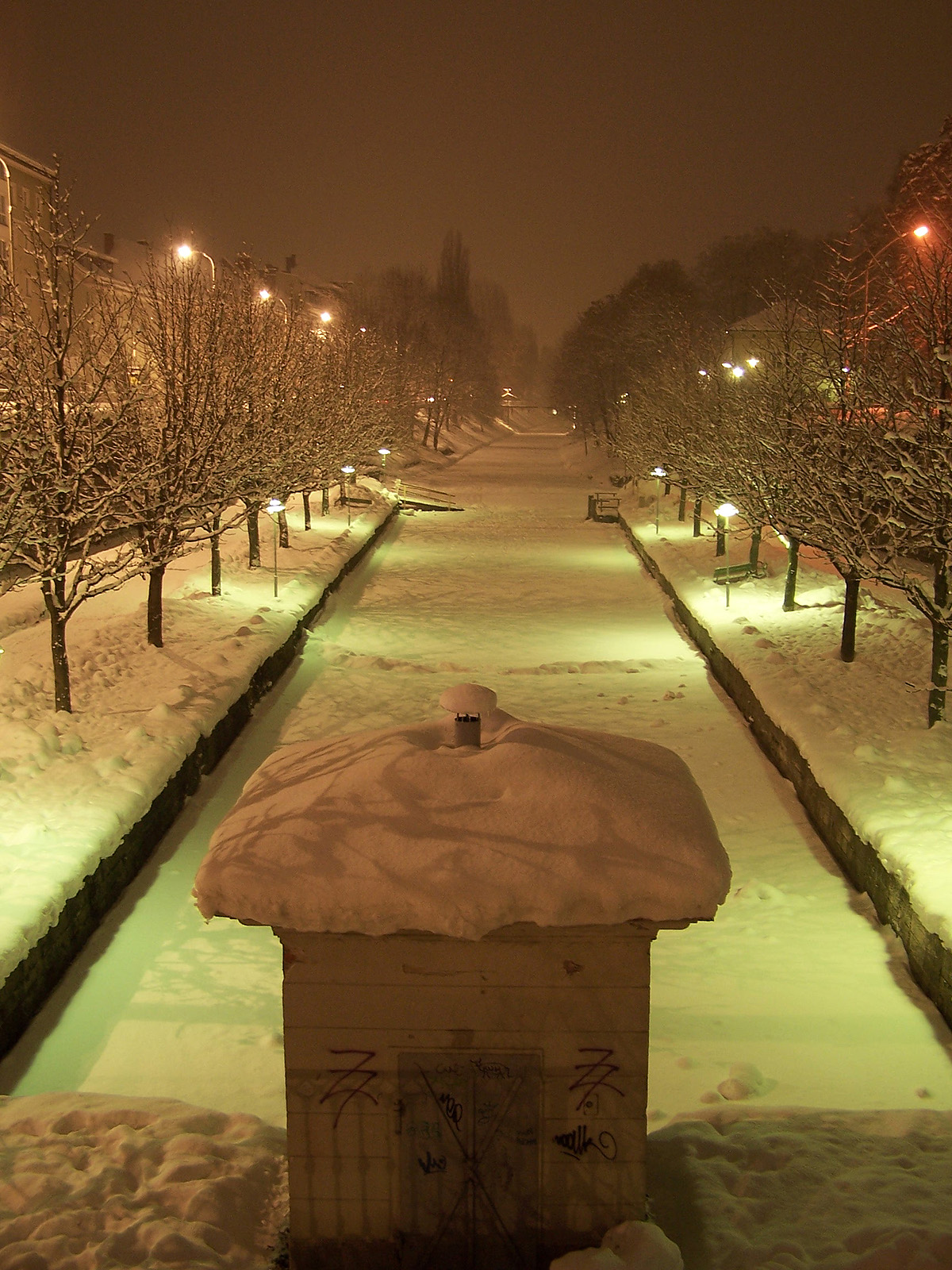 Der Lendhafen von Klagenfurt, Nachtaufnahme im Winter - Lendkanal (night view, winter) 14:37, 28. Dez 2005 Eixi 1200 x 1600 (648113 Byte) (* Bildbeschreibung: Der Lendhafen von Klagenfurt, Nachtaufnahme im Winter * Quelle: selbst fotografiert * Fotograf/Zeichner: ~~~~ * Datum: 27. Dezember 2005)